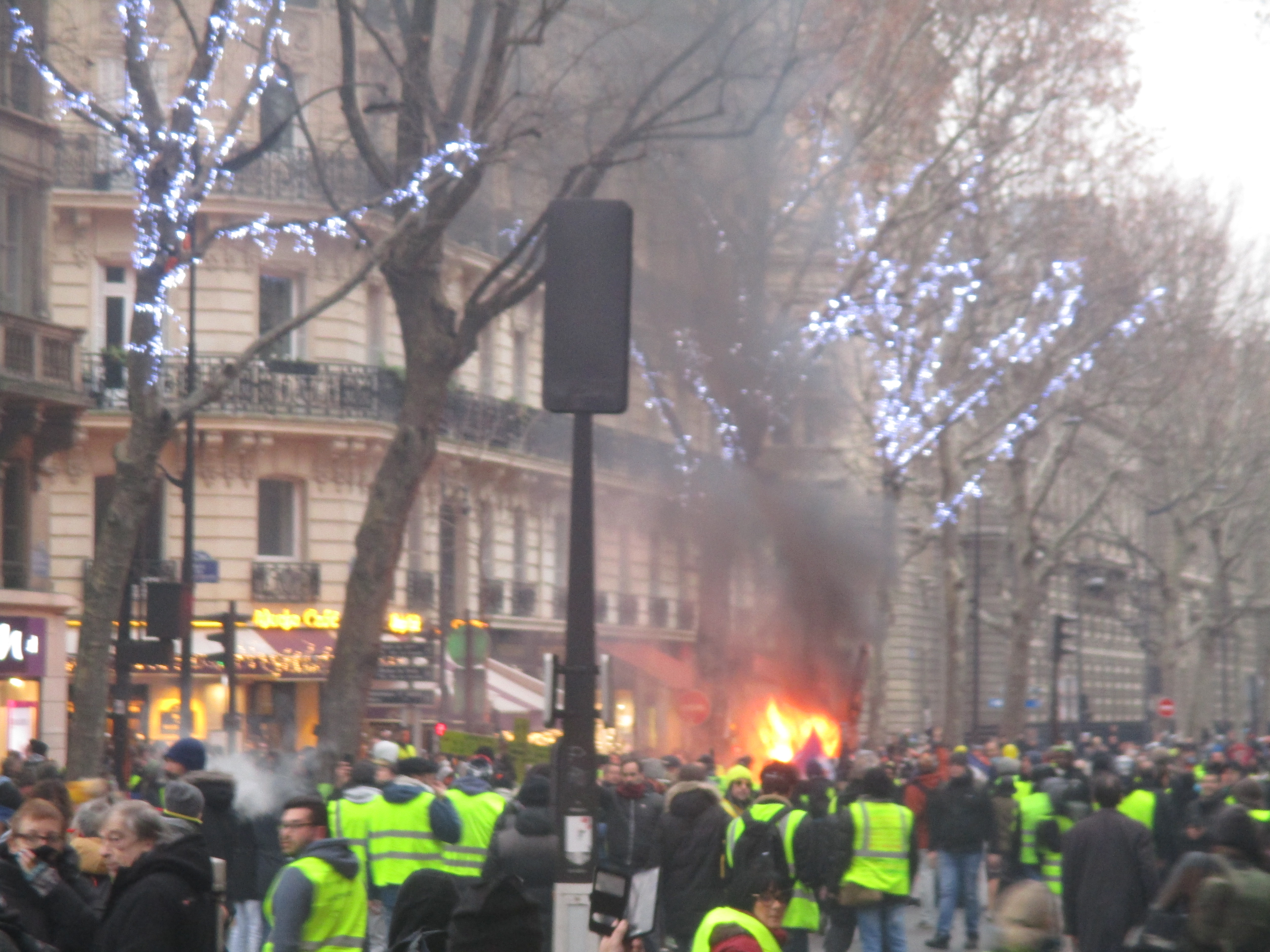 Manifestation des gilets jaunes, boulevard Saint-Germain à Paris, le 5 janvier 2019. Un sapin de Noël est embrasé.